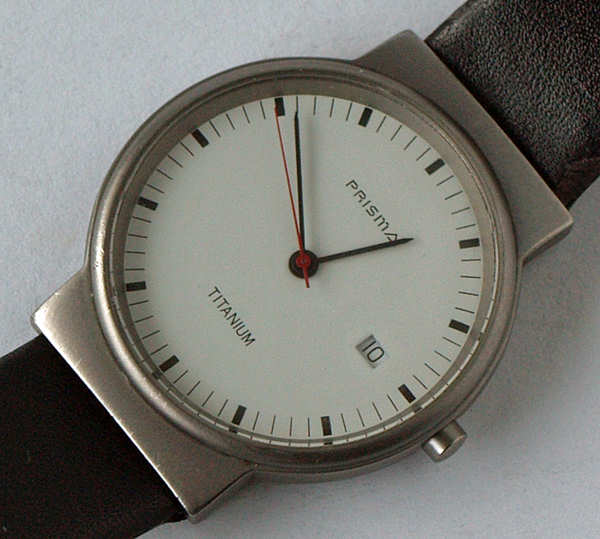 Prisma heren horloge